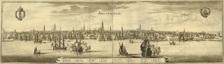 Title:Amsterdam; 20 x 72cm